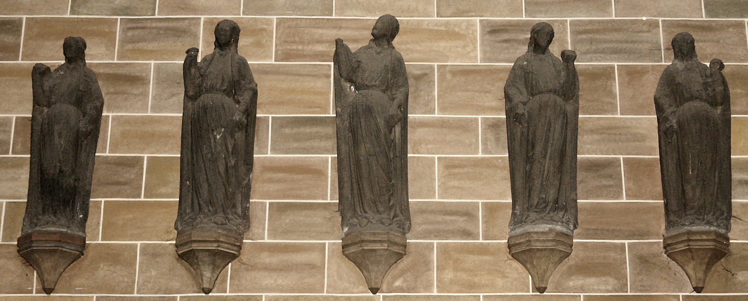 Bremer St. Petri Dom: Die fünf klugen oder rötichten[1] Jungfrauen (erste Hälfte des 13. Jh.), heute über dem Windfang des Brautportals nördlichen Seitenschiff, bis 1888 im der untersten (Blend-) Arkade im Giebeldreieck der Westfassade. Daher stark verwittert. Inzwischen (Dezember 2015) hängen die Skulpturen in umgekehrter Reihenfolge als auf diesem Bild. (Qu.: Der Dom zu Bremen, ISBN 3-7845-4231-X)